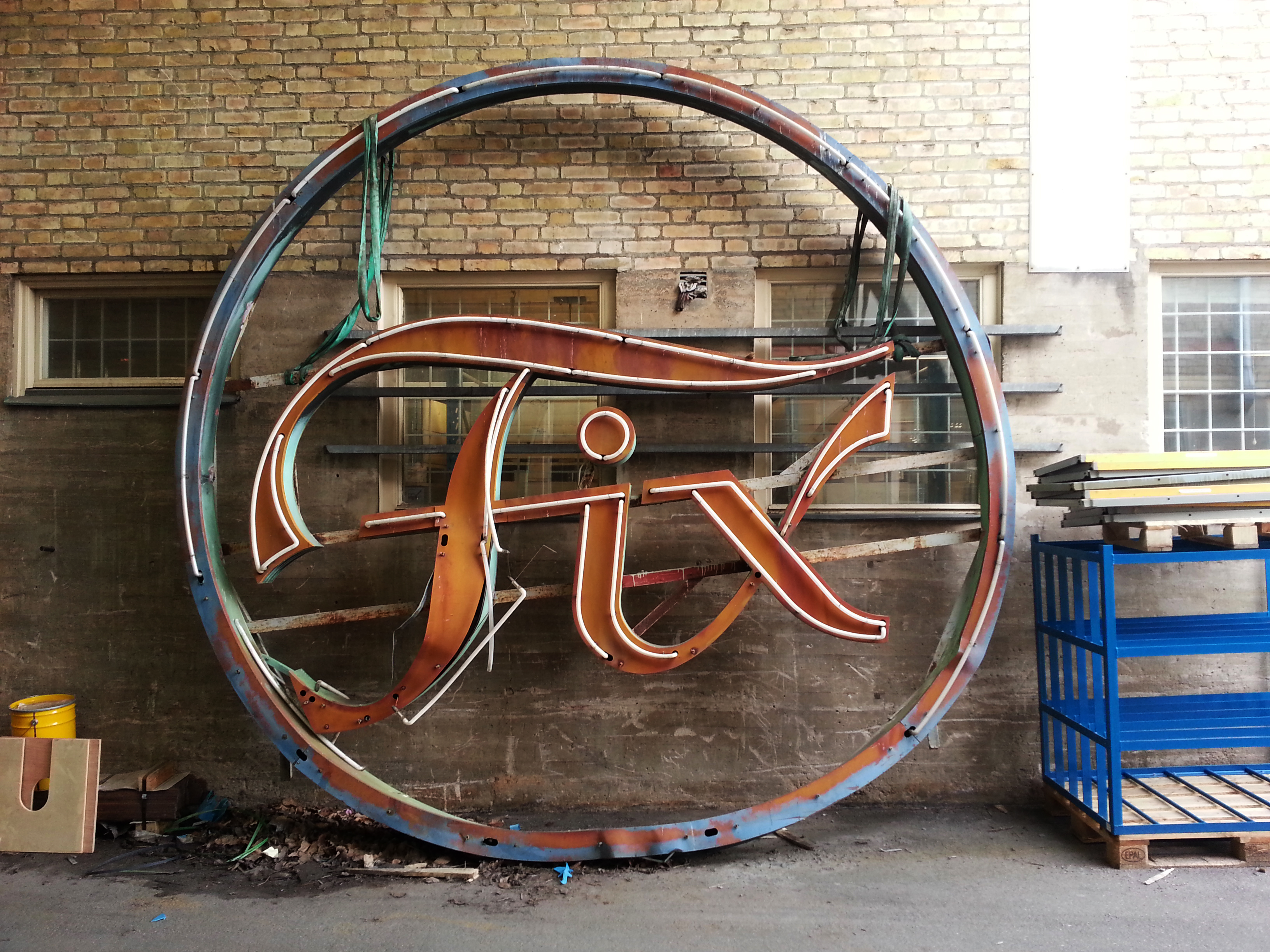 Skylten från "Fix AB". Förfallen, men sparad.